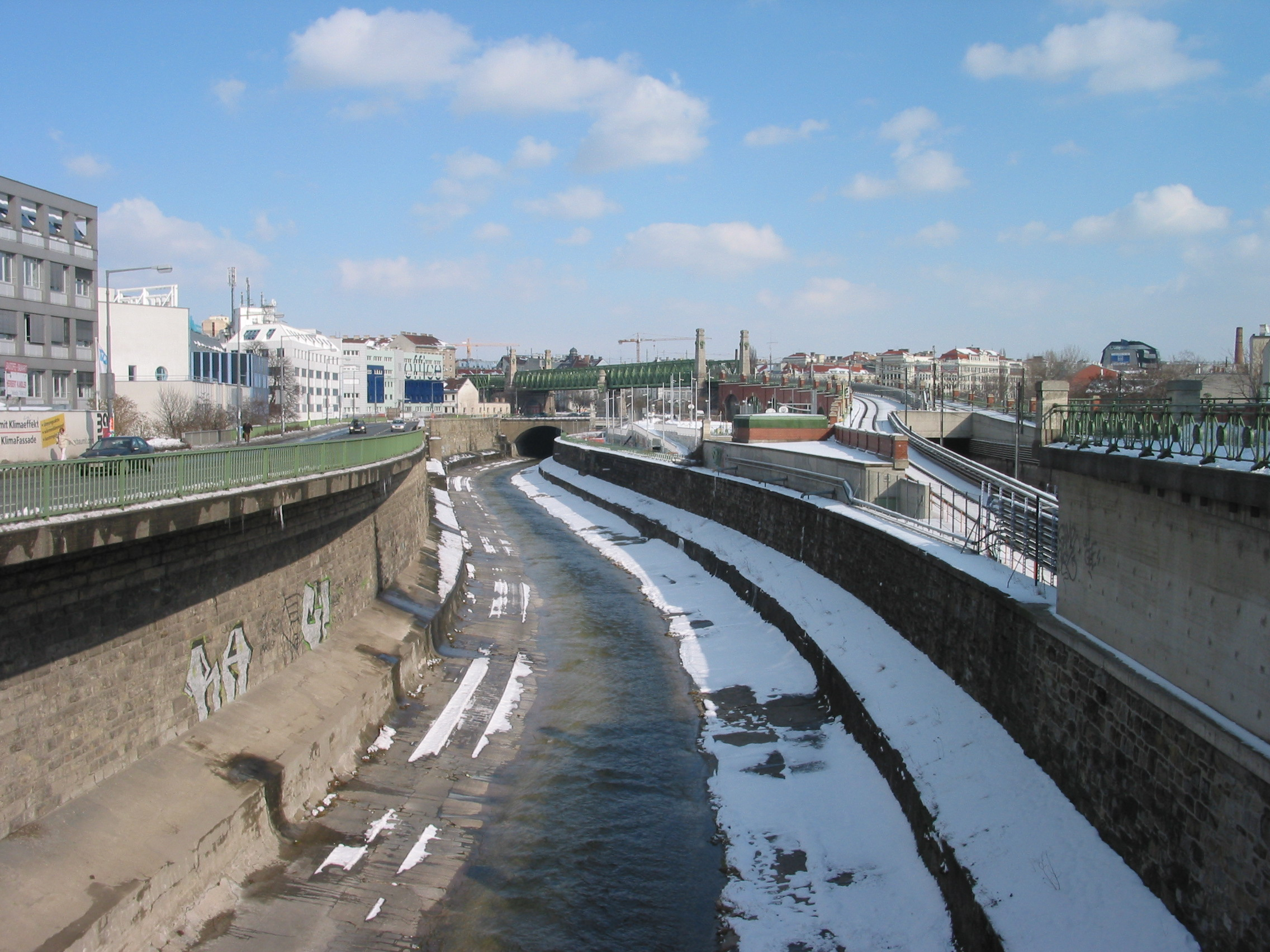 Eisenbahnbrücke, Otto-Wagner-Brücke über die Wienzeile samt Anschlussbauwerken und Umgebung